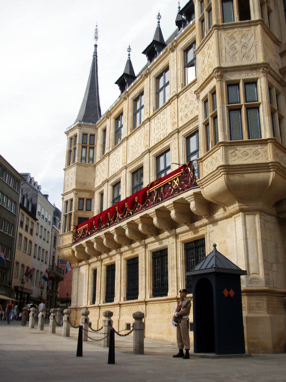 De groussherzogleche Palais um Krautmoart. Auteur: Otets.